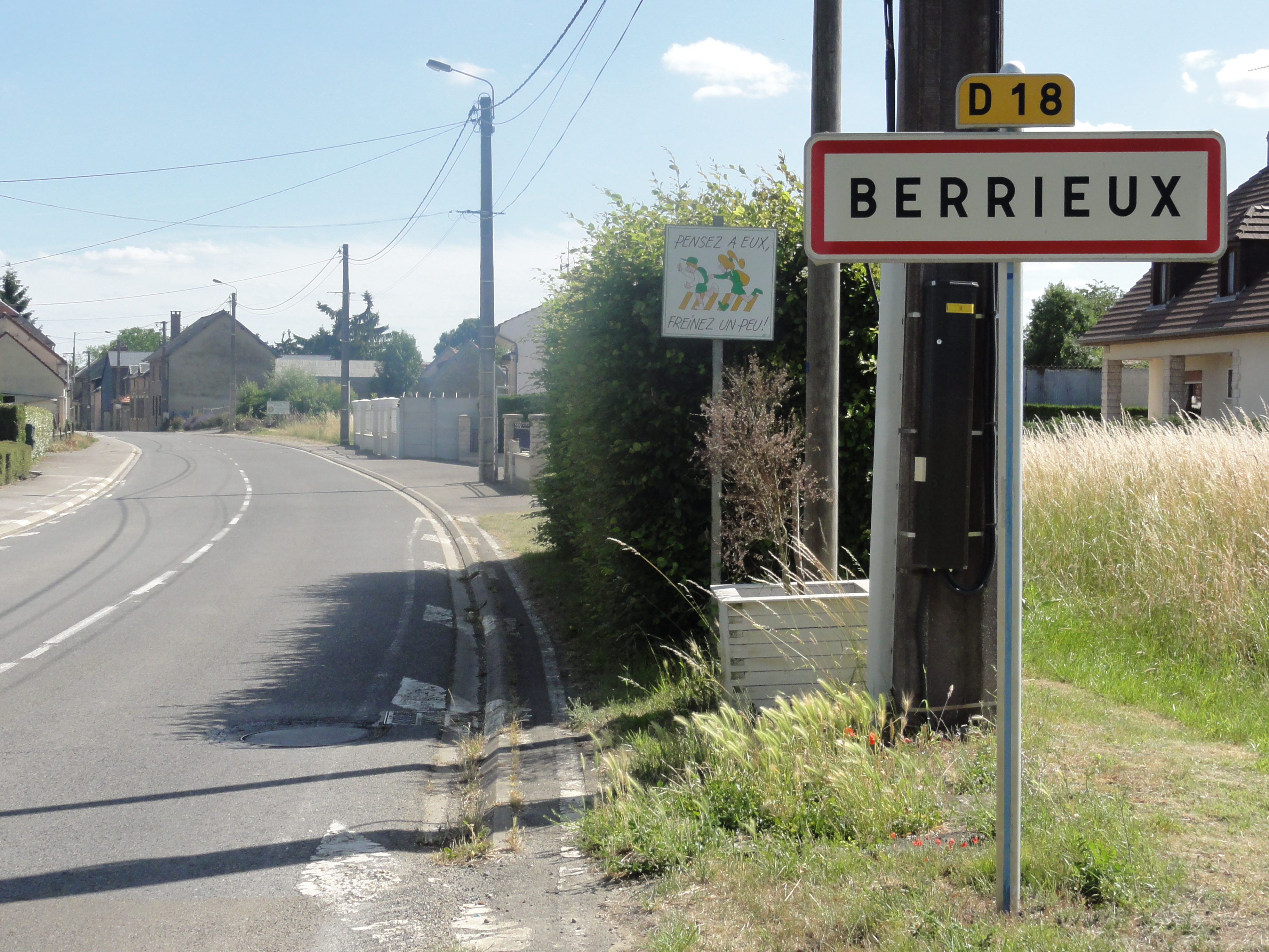 Berrieux (Aisne) city limit sign